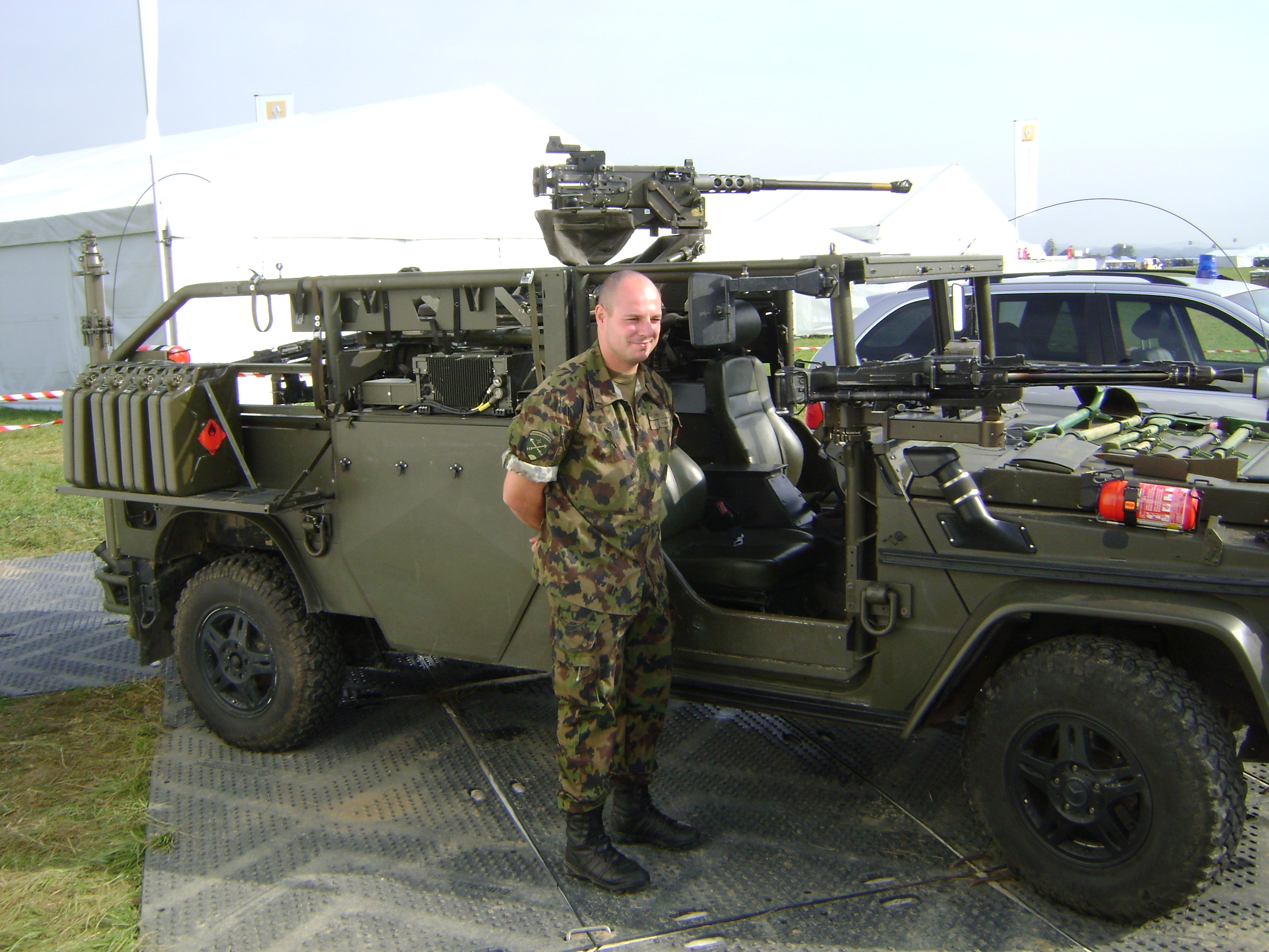 KSK Fahrzeug